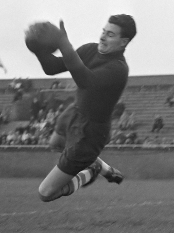 Ajax tegen Neptunus 0-1. Landman redt 28 november 1947